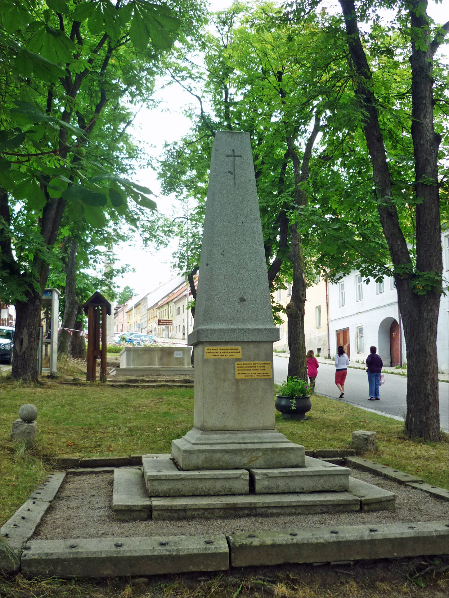 Gedenkstein zur Erinnerung an die Passionsspiele in Höritz (Hořice na Šumavě) im Böhmerwald